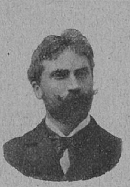 Karel Richter (1862-1942), rakouský politik z Moravy; poslanec Moravského zemského sněmu